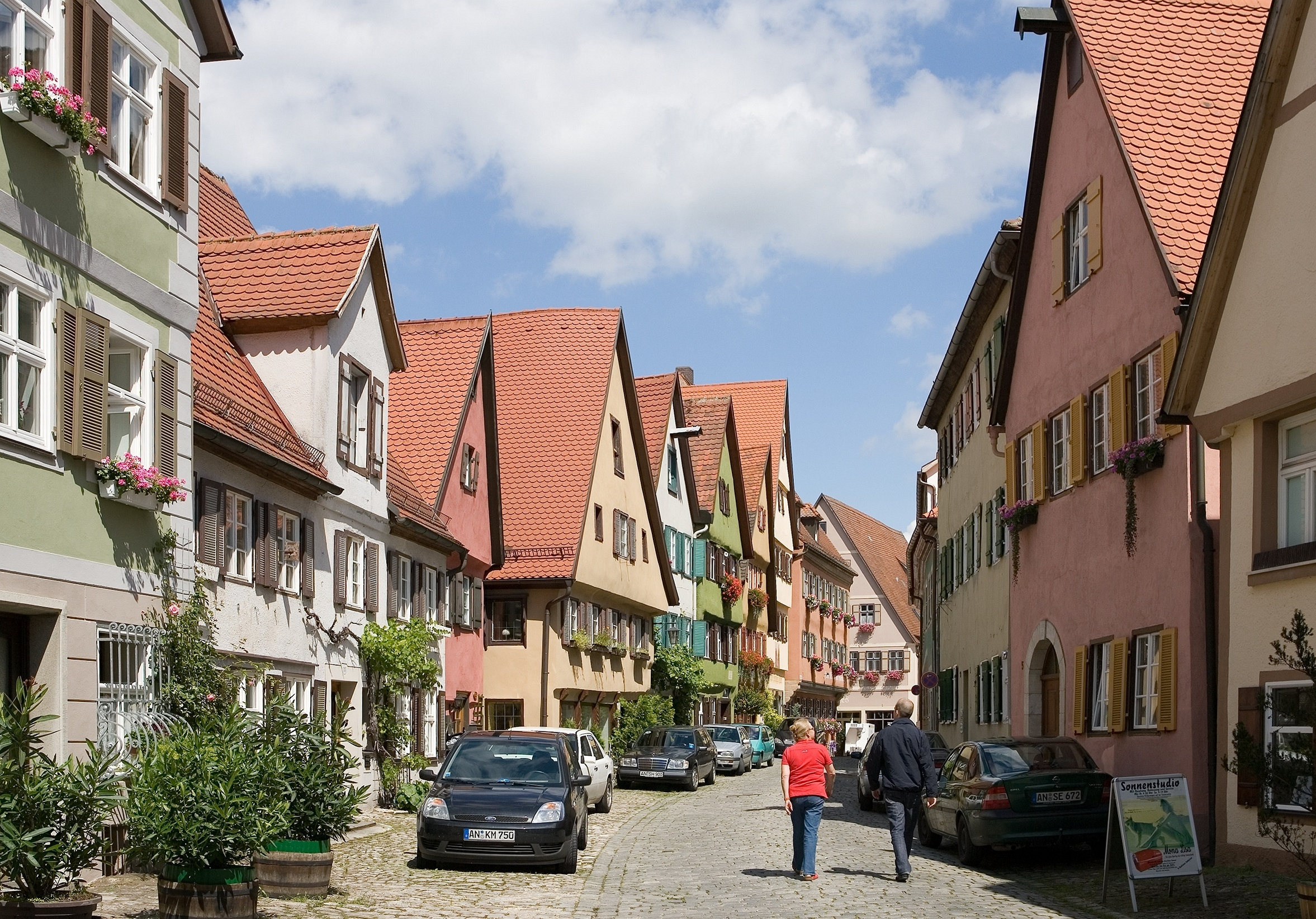 Blick Richtung Osten in der Elsasser Gasse in der Altstadt von Dinkelsbühl. Selber fotografiert im Juli 2007, Doppellizensierung GFDL & CC-BY-SA 2.5.